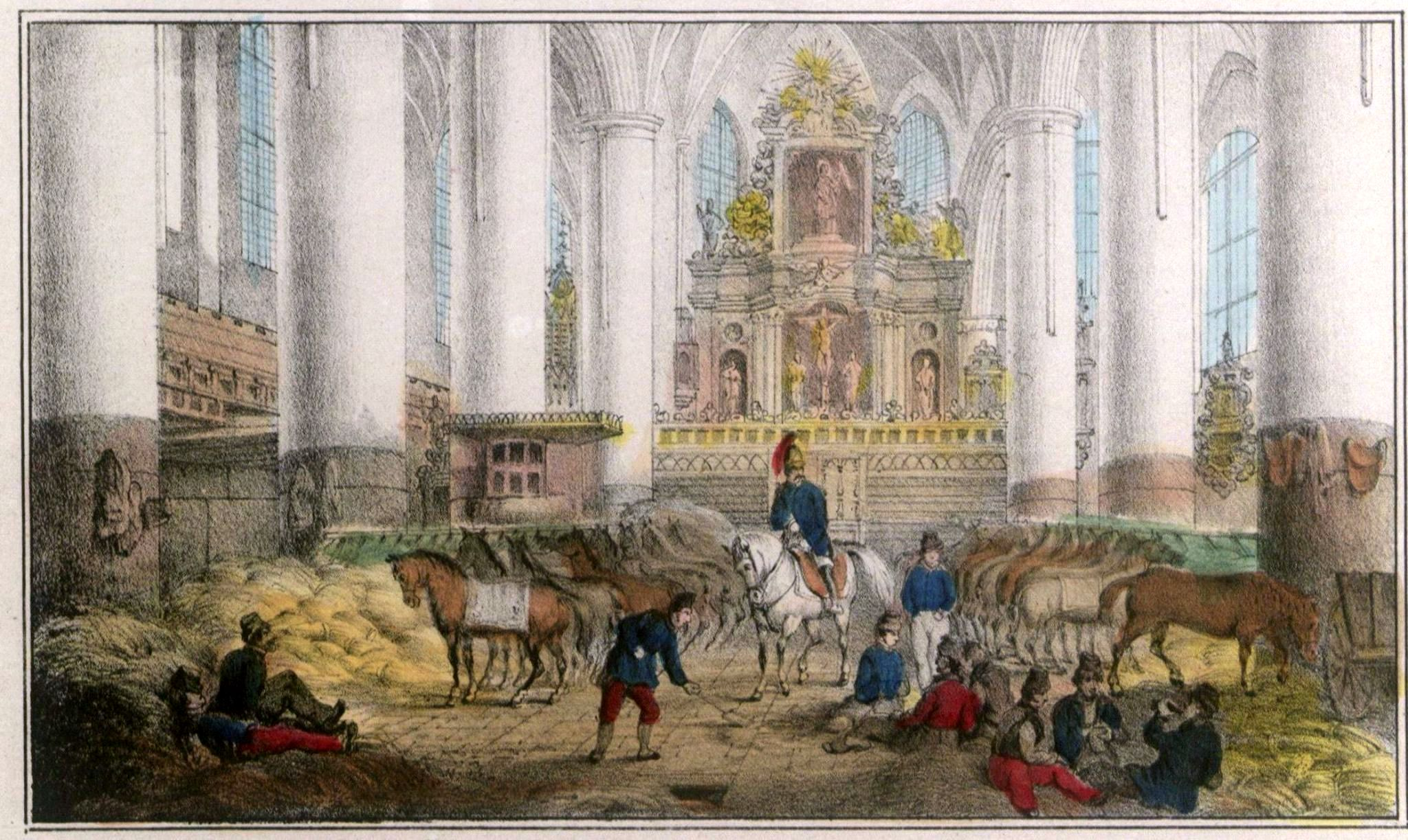 Die St.Petri Kirche in Hamburg als Pferdestall 1814. Nach der Natur gez. v. P. Suhr in Hamburg. Kreidelithographie 1830